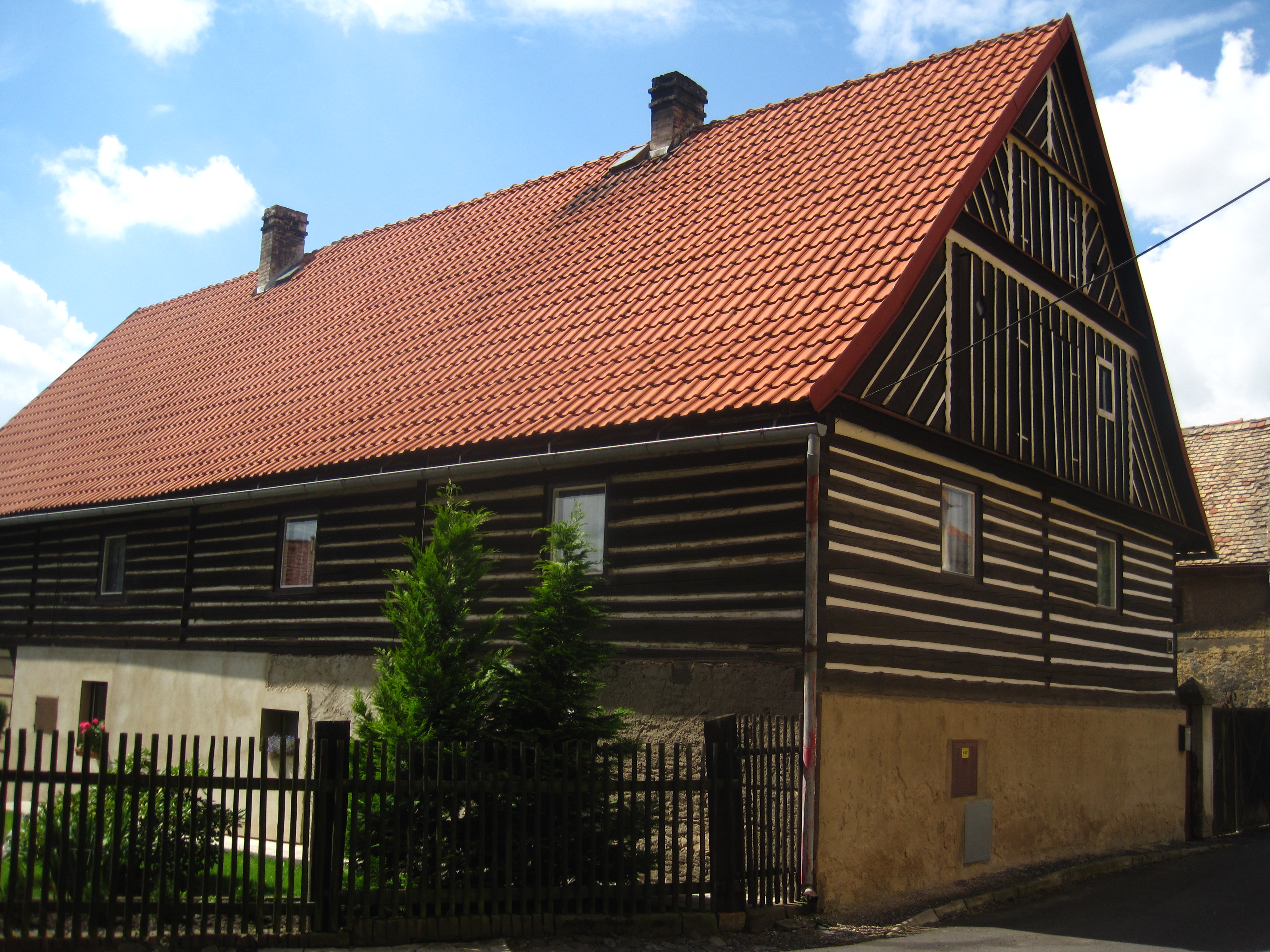 Usedlost čp. 67, Liběšice 67, Liběšice (okres Litoměřice).